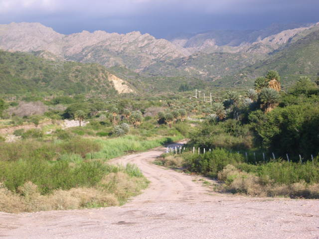 Camino del Río. Papagayos, San luis